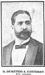 Retrato de Demetrio Alonso Castrillo, vicepresidente del Congreso en 1905, obra de Manuel Alviach y recogido en la revista española Nuevo Mundo.